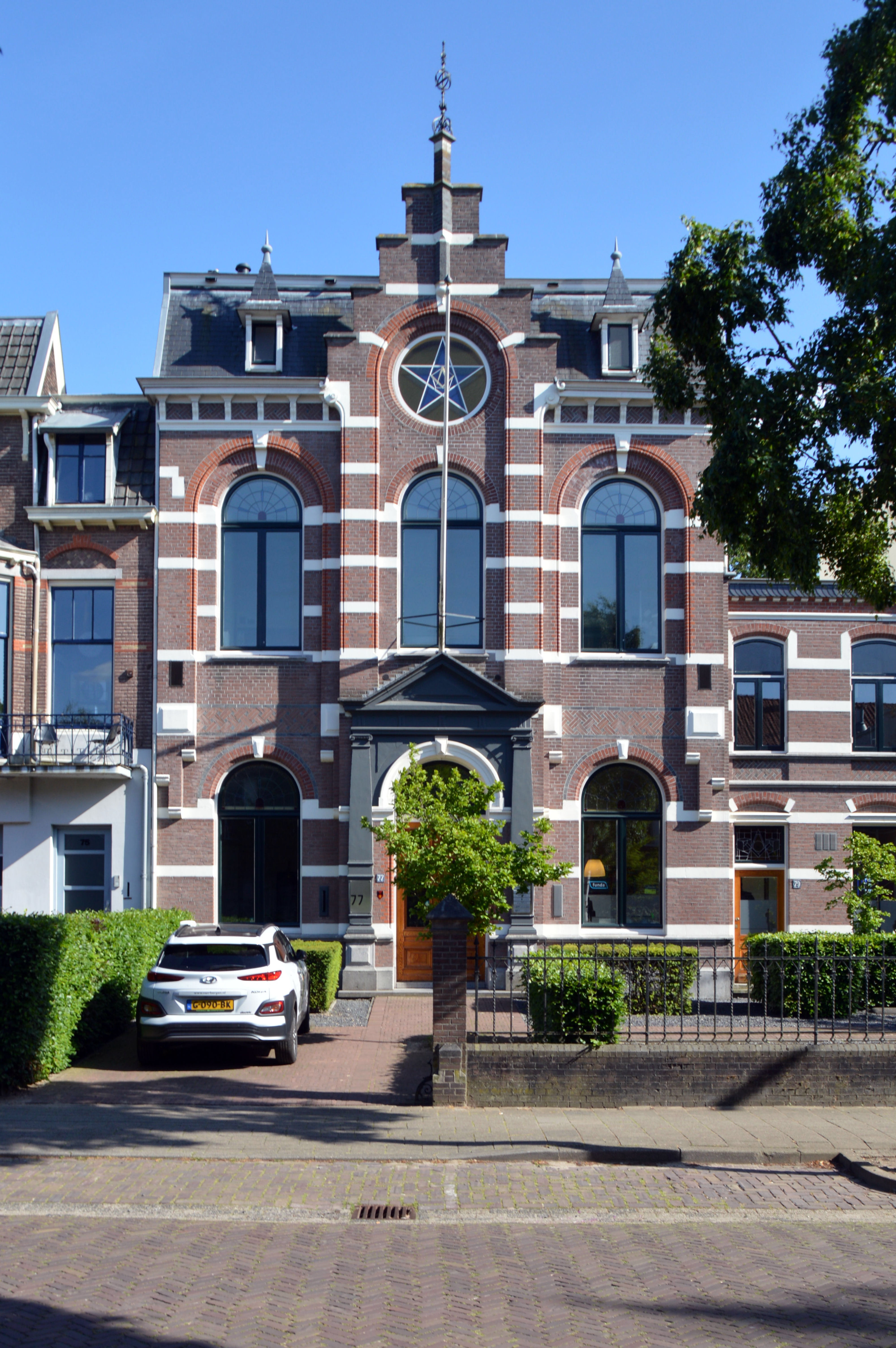 Loge St. Lodewijk Waldeck Pyrmontsingel 77 Rijksmonumentnummer 523048 Neorenaissance 1899 Nijmegen